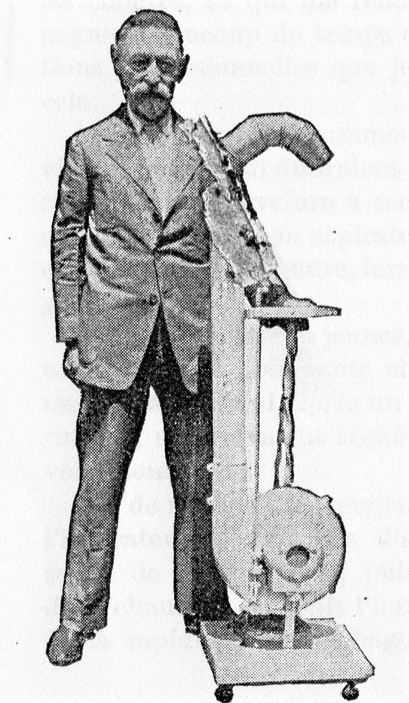 Alexandre Ferdinand Godefroy, à côté de son premier séchoir électrique à trompe et à pied construit par lui-même en 1895